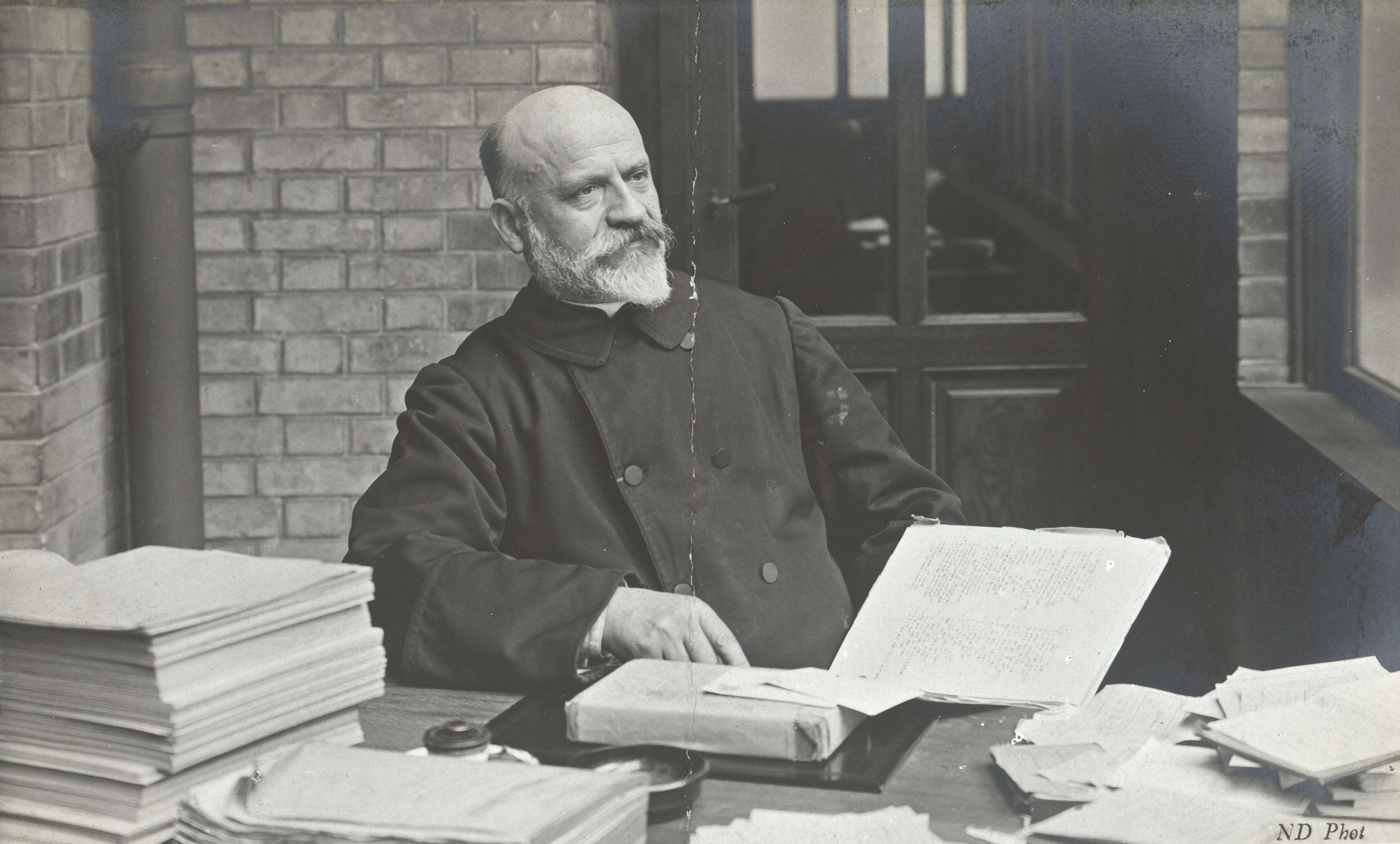 Portrait du père Jean-Vincent Scheil, professeur d'Assyriologie à la Sorbonne Titre imprimé partiellement biffé et rectifié à la main.